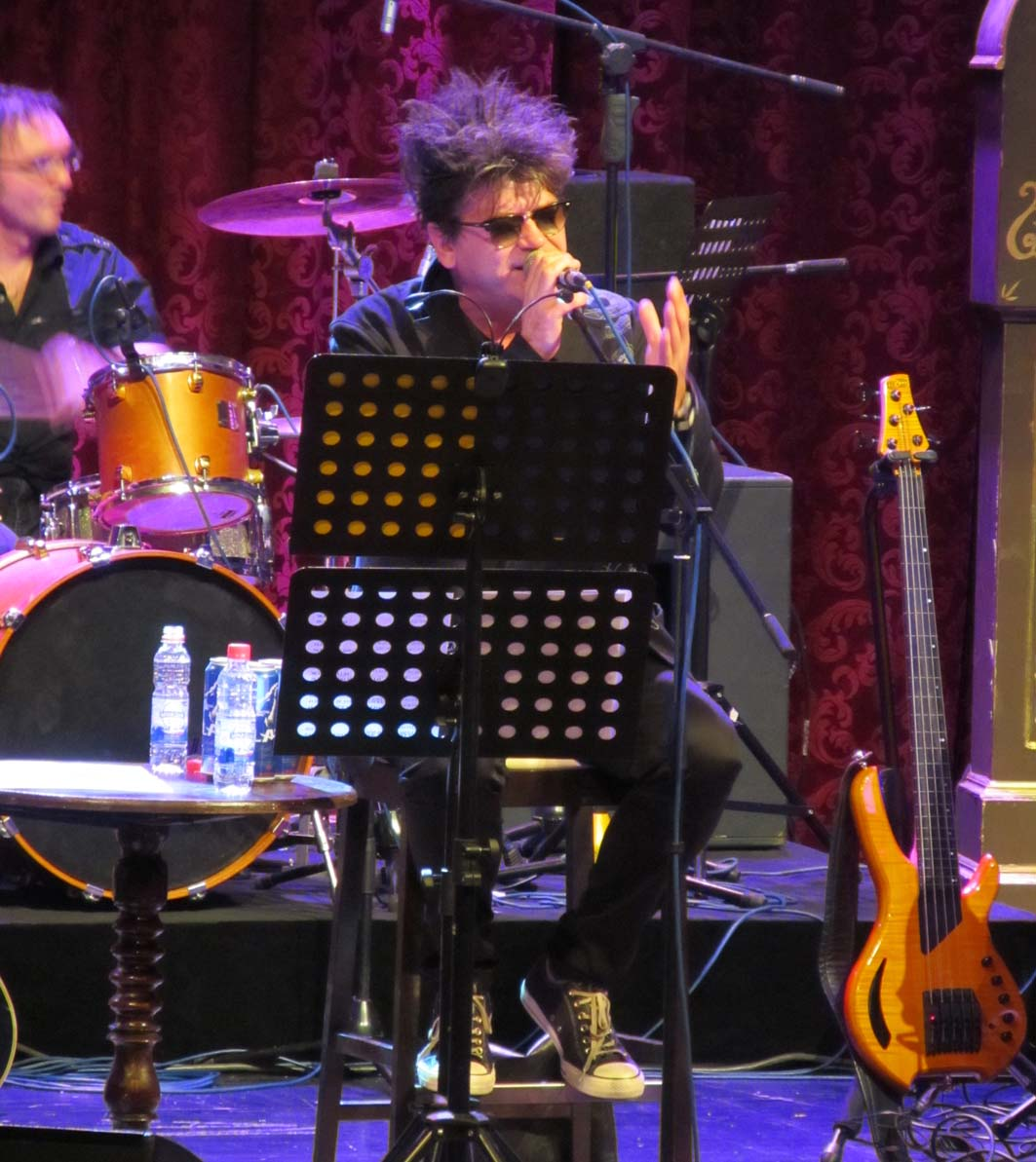 Autor fotografije Dušica Stanojev Rikić, u Novom Sadu, Koncert u SNP, April 2014. godina.